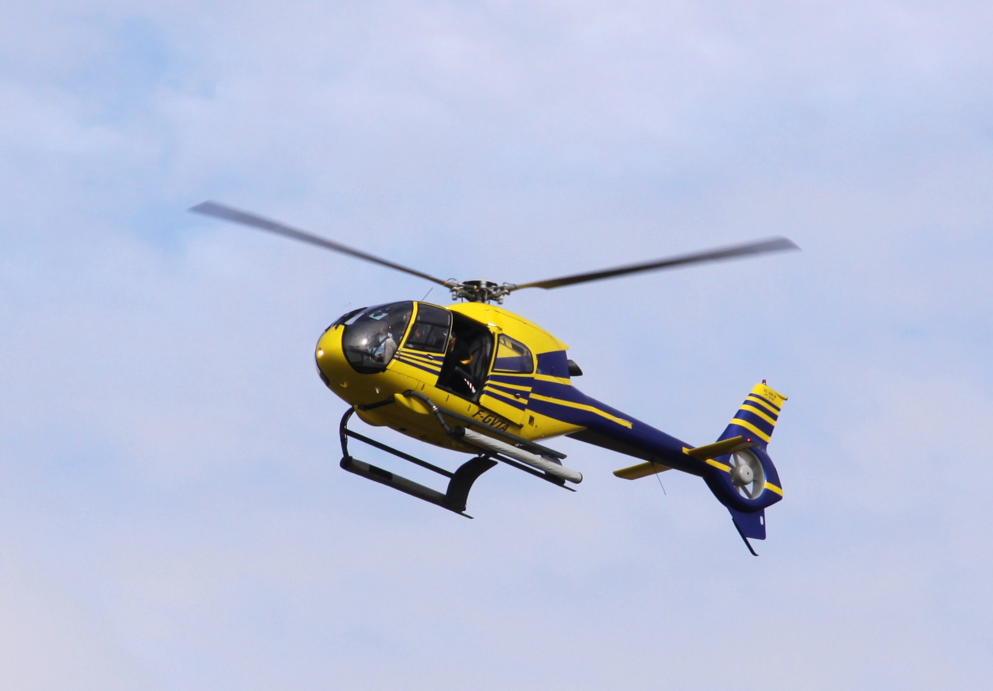 L' hélicoptère Eurocopter EC120 Colibri (EC120 B) immatriculé F-GVTA survolant la Corderie Royale de Rochefort lors du lancement du navire "L' Hermione" réplique de la frégate "L' Hermione" construite en 1778. Photographie recadrée. Rochefort-sur-Mer, Charente Maritime, France.